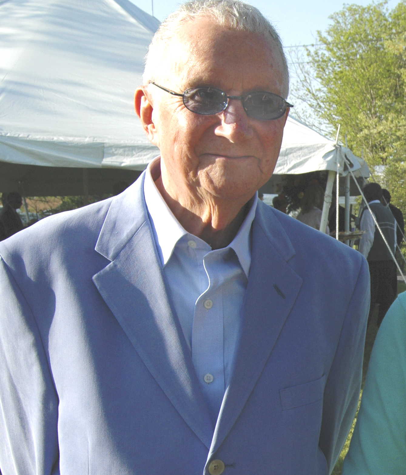 John Paul Hammerschmidt. Taken at the Ozark Arts Council Fundraiser